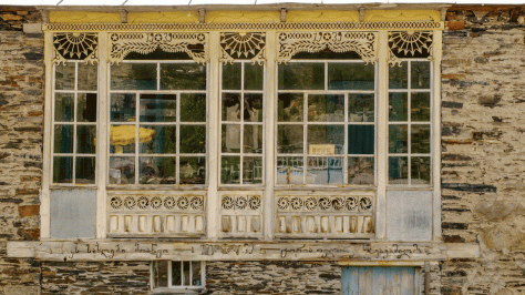 Holzbalkon mit Sowjetsymbolen in Ushguli